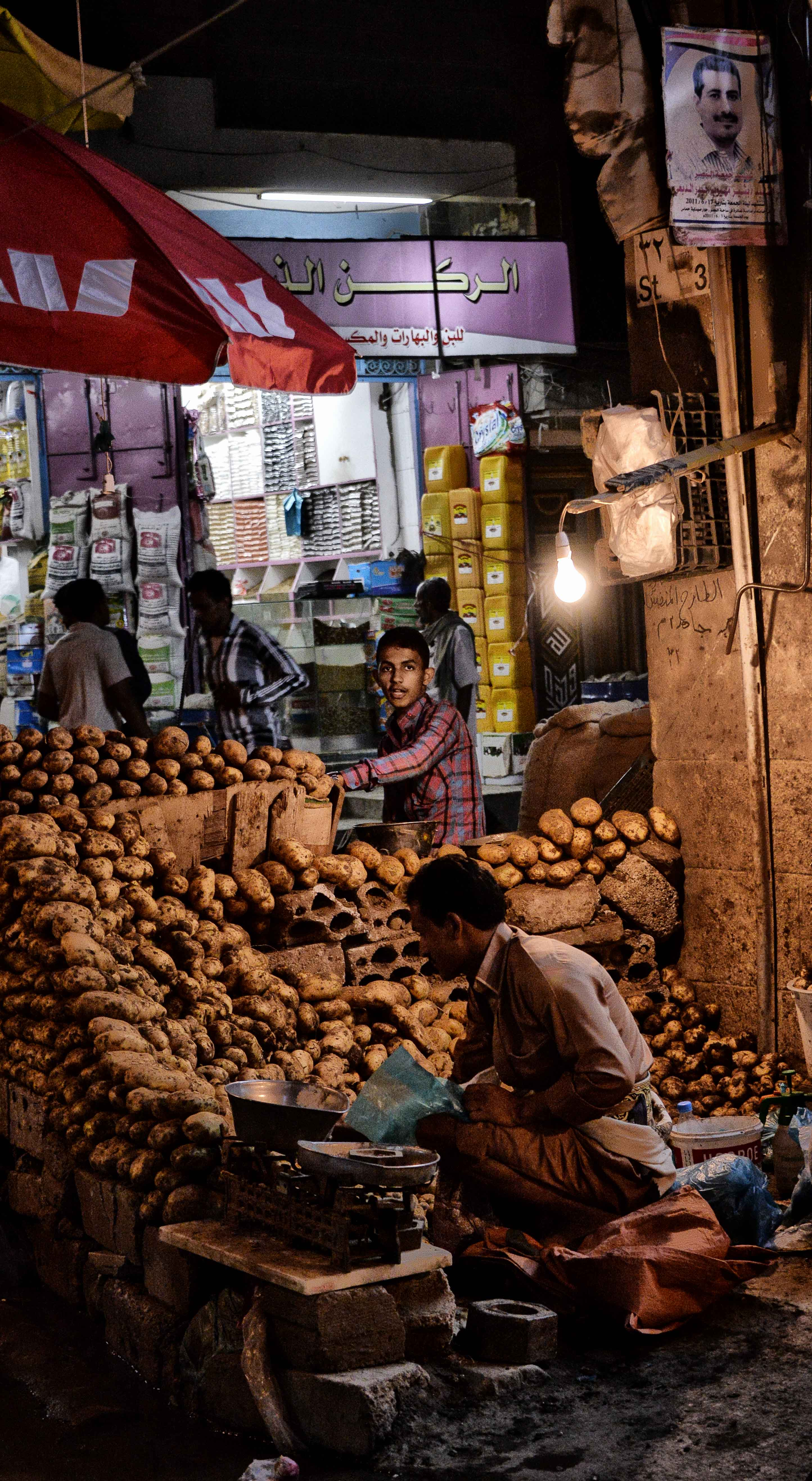 Potato Seller, Yemen